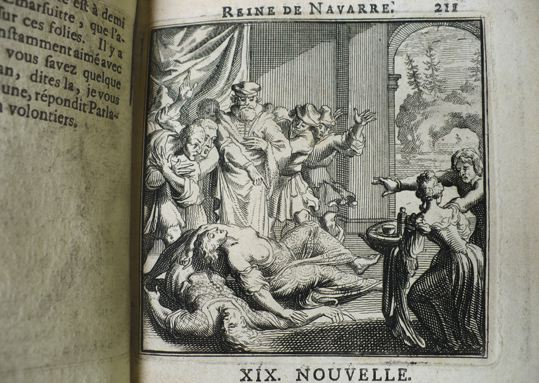 Nouvelle 19 de l'Heptaméron, éd. 1698 Notice Utpictura18